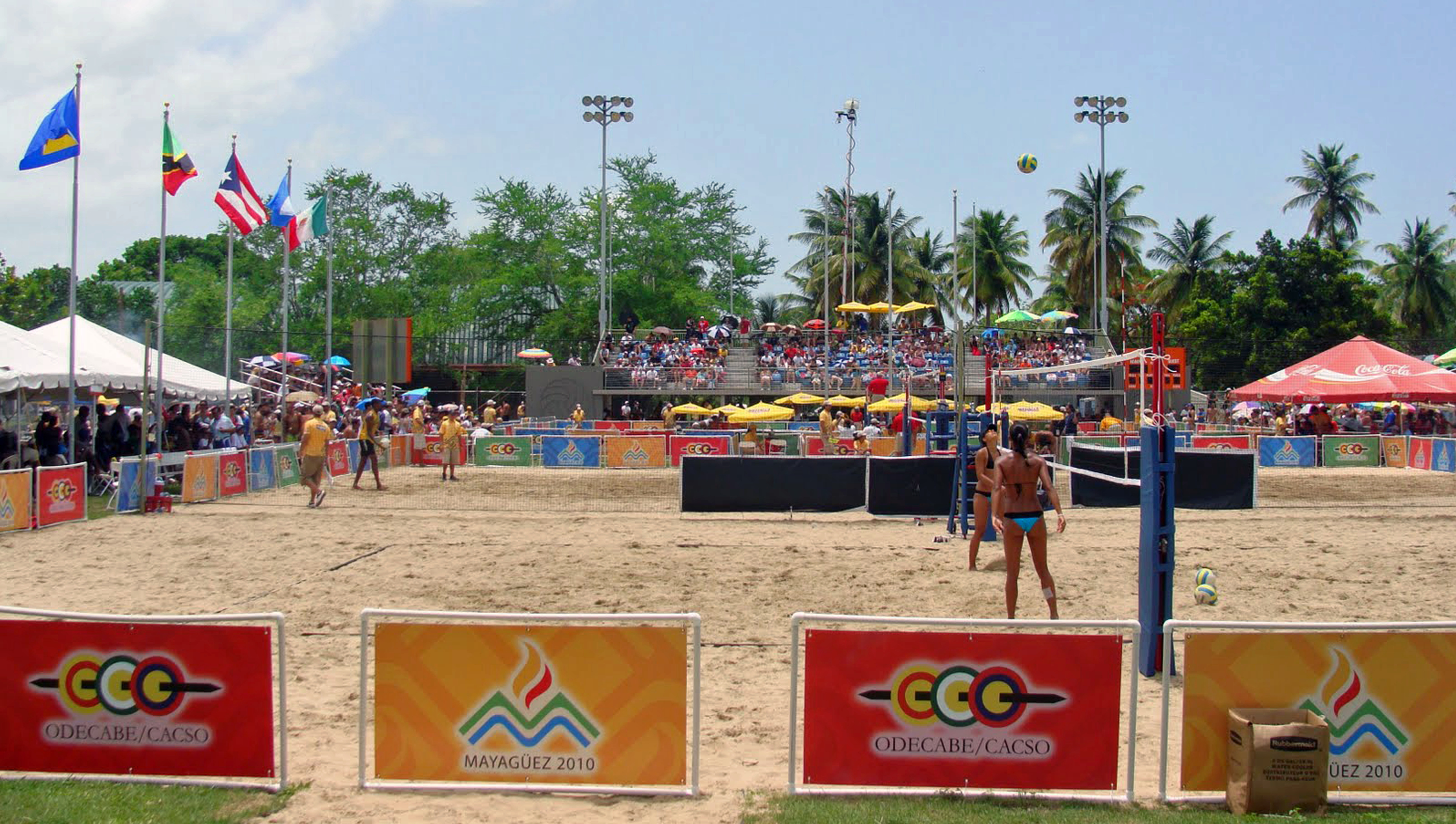 Estadio de Voleibol de Playa en Boquerón.